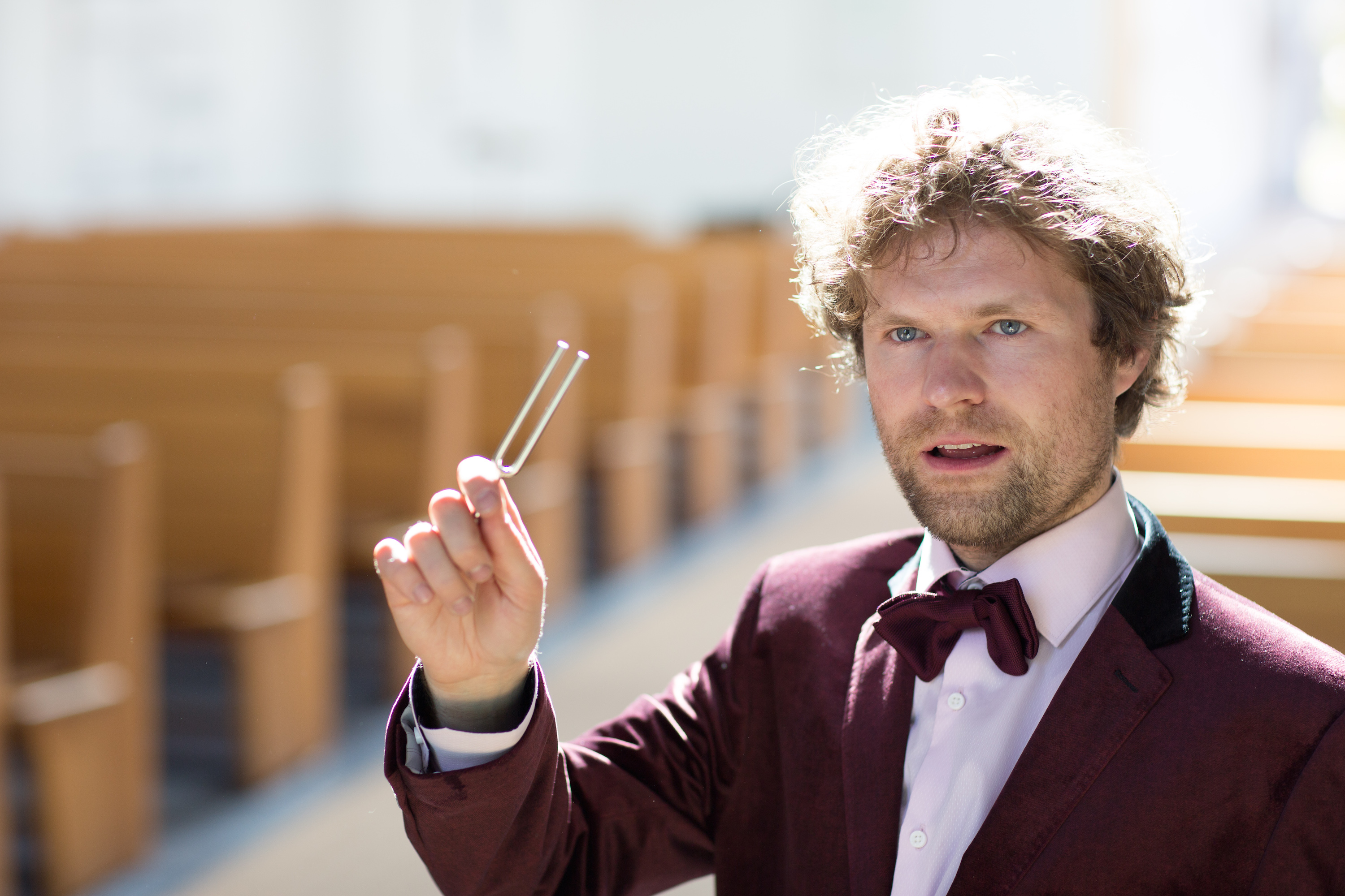 Dirigent ja laulja Endrik Üksvärav